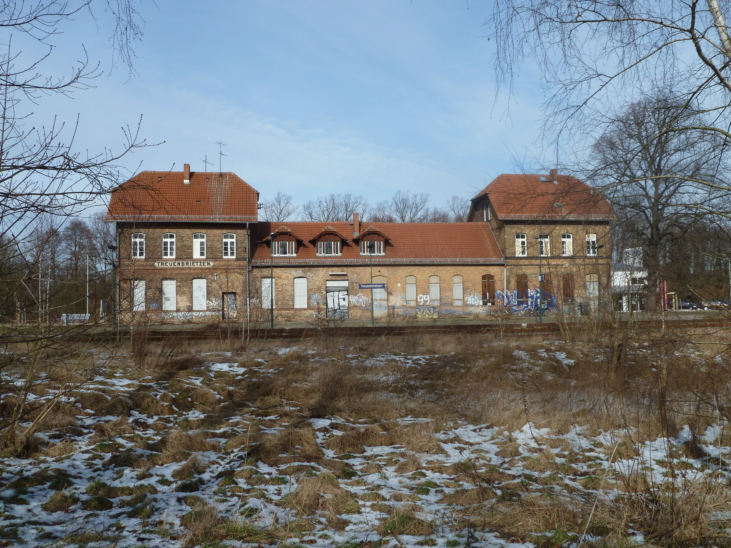 Bahnhof Treuenbrietzen, denkmalgeschütztes Empfangsgebäude